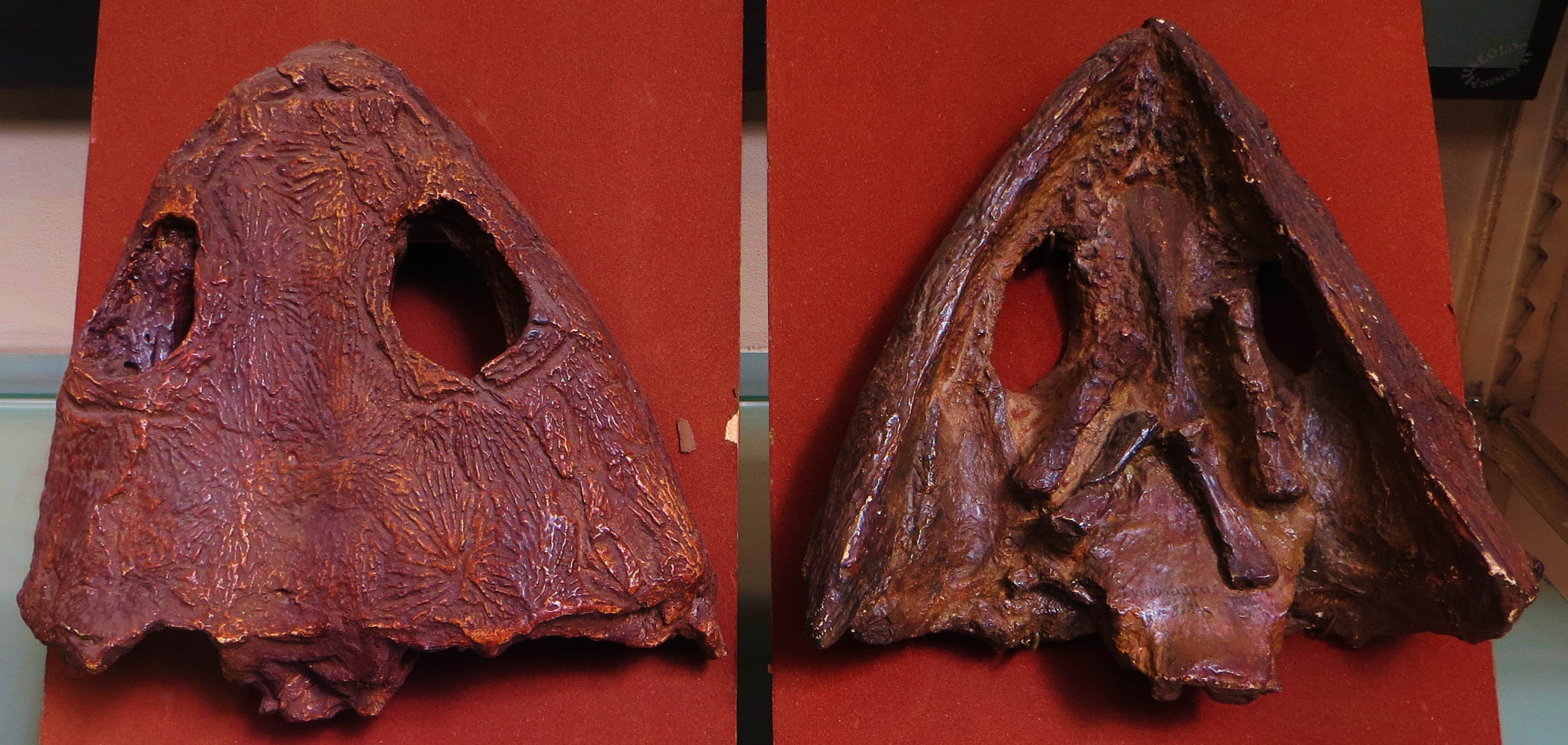 Fossil of Dvinosaurus, an extinct amphibian- Took the photo at Musee d'Histoire Naturelle, Paris